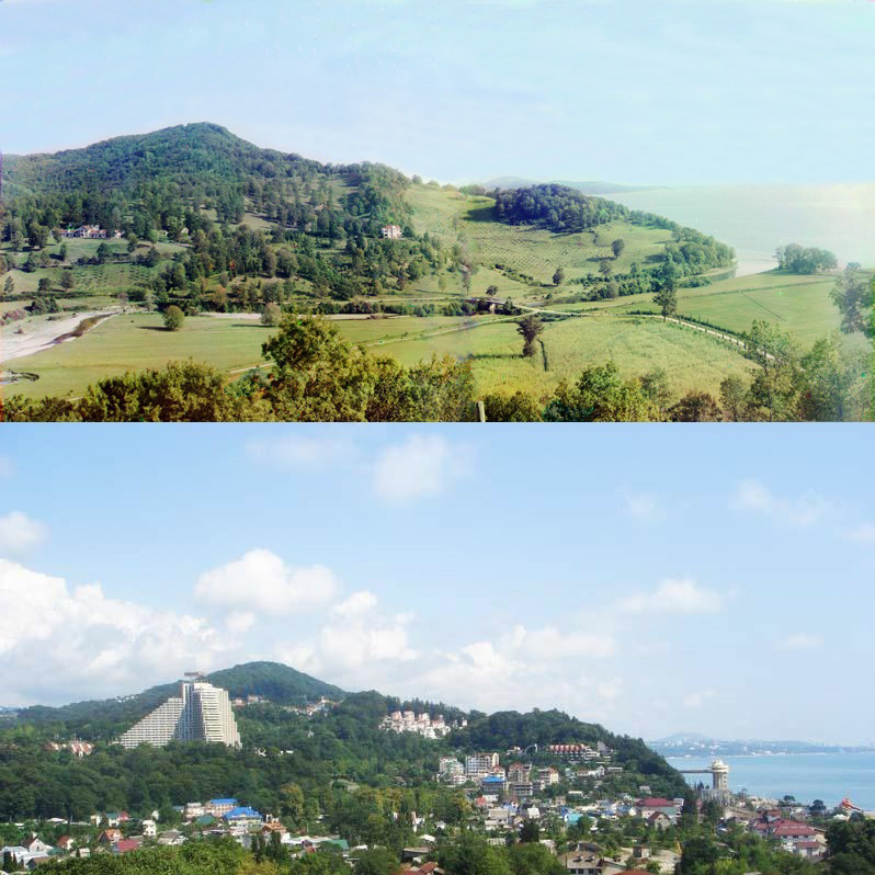 Дагомыс в начале XX века и сейчас. Вверху - панорама из двух фото С.М. Прокудина-Горского (между 1905 и 1915 гг.). Внизу - современный вид.